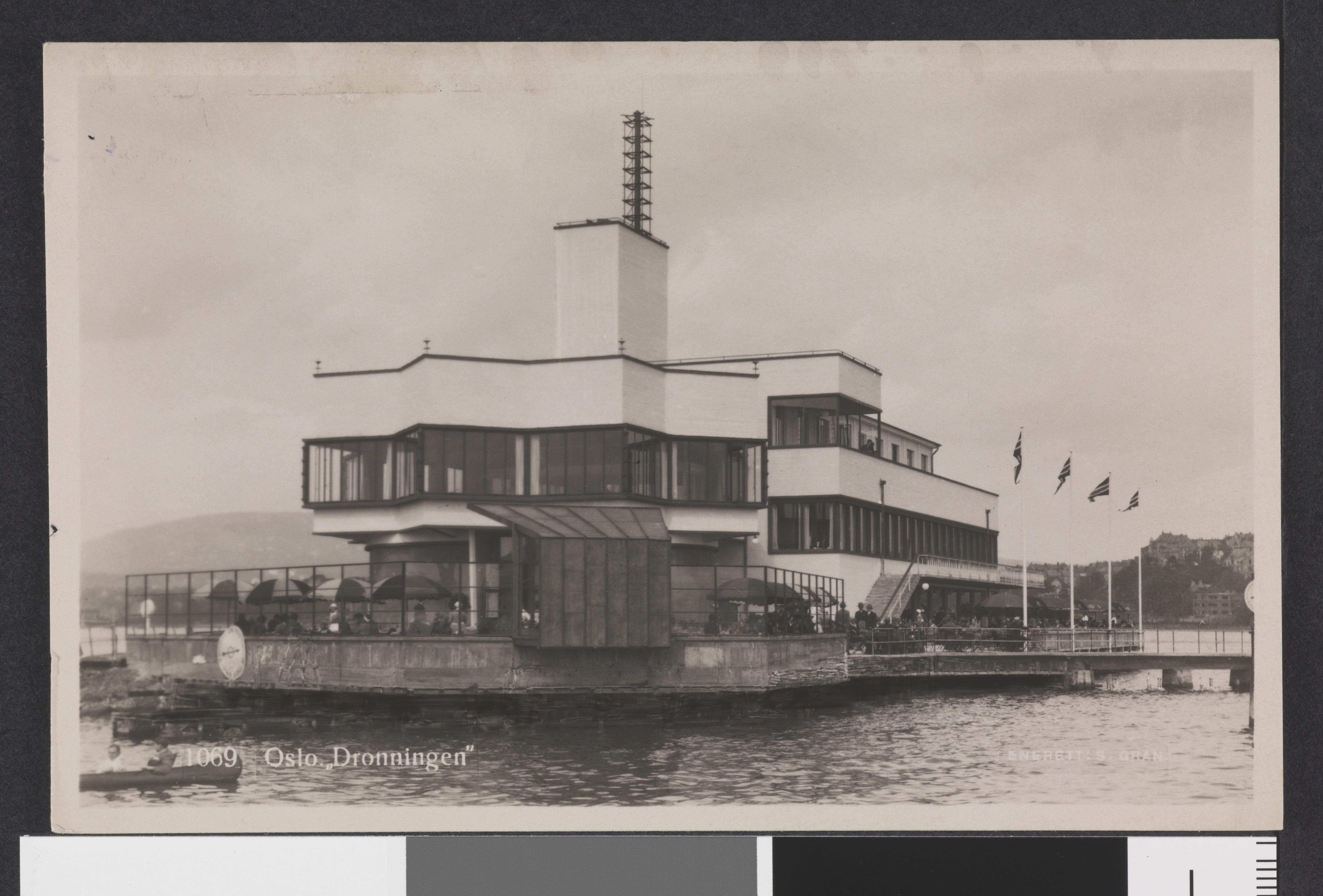 Bildet er hentet fra Nasjonalbibliotekets bildesamling Bygdøy, Oslo, Oslo